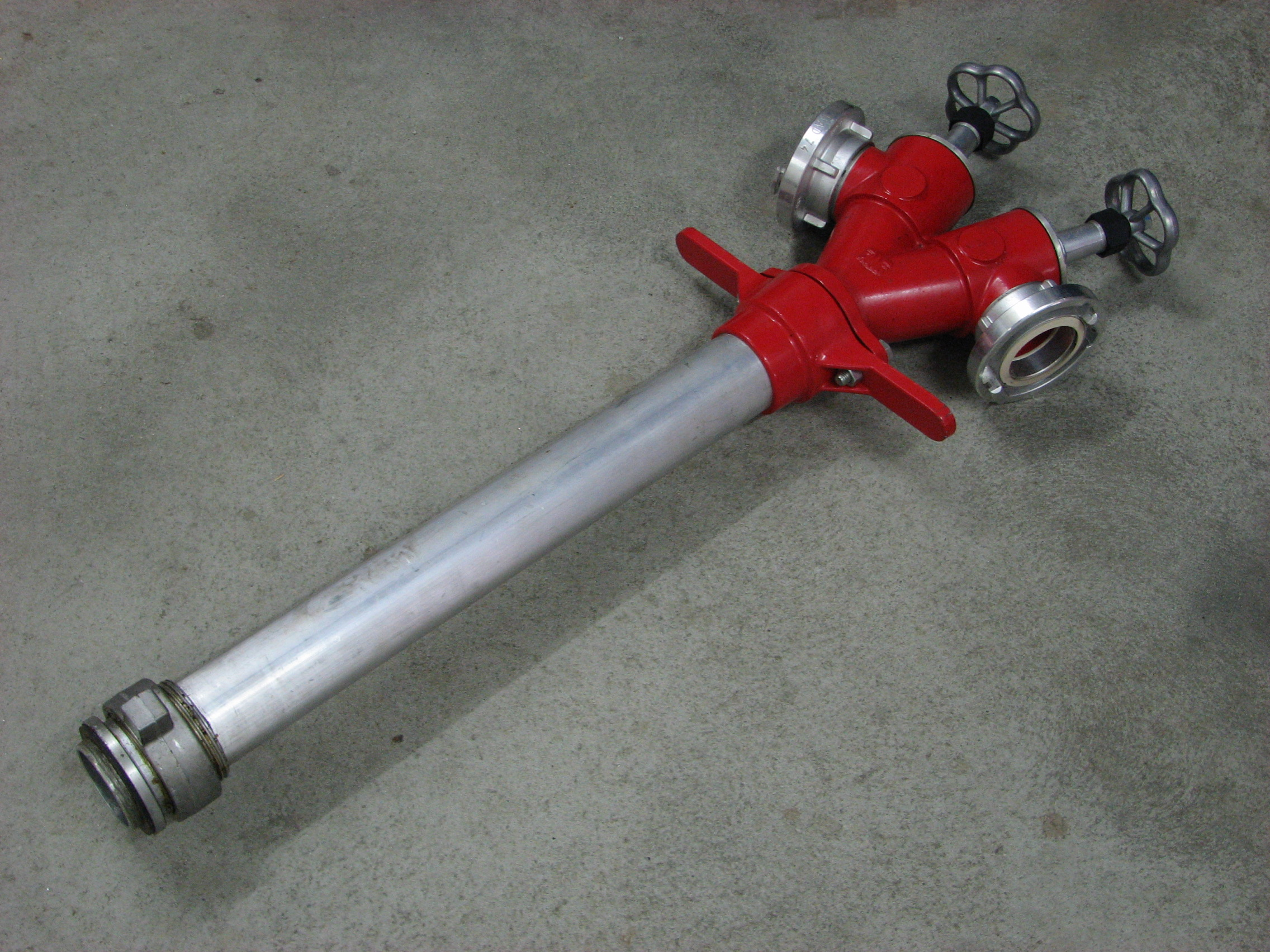 Standrohr